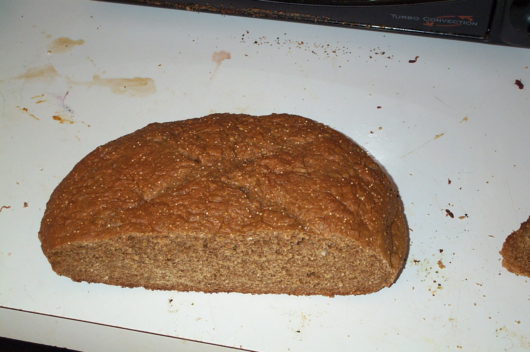 לחם דגנים מלאים.